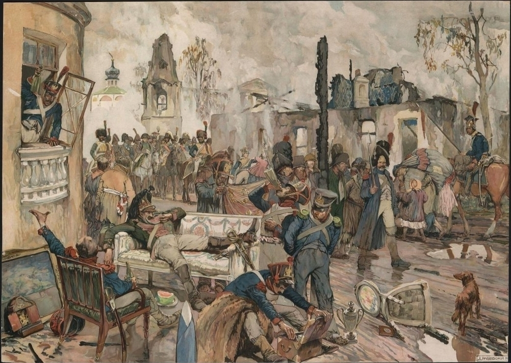 Картины по русской истории. № 43: Д.Н. Кардовский. Москва в сентябре 1812 года - 1913